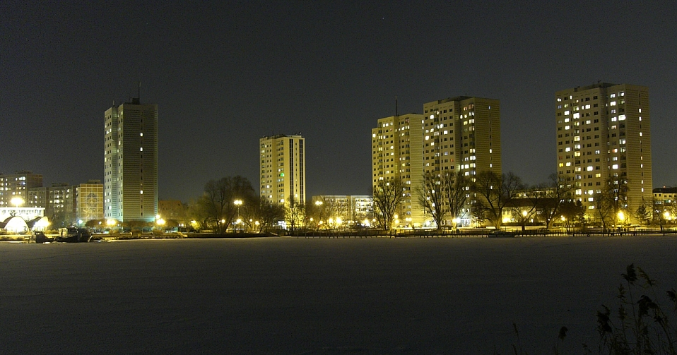 Potsdam, Blick von der Eisenbahnbrücke nach Norden über die zugefrorene Neustädter Havelbucht